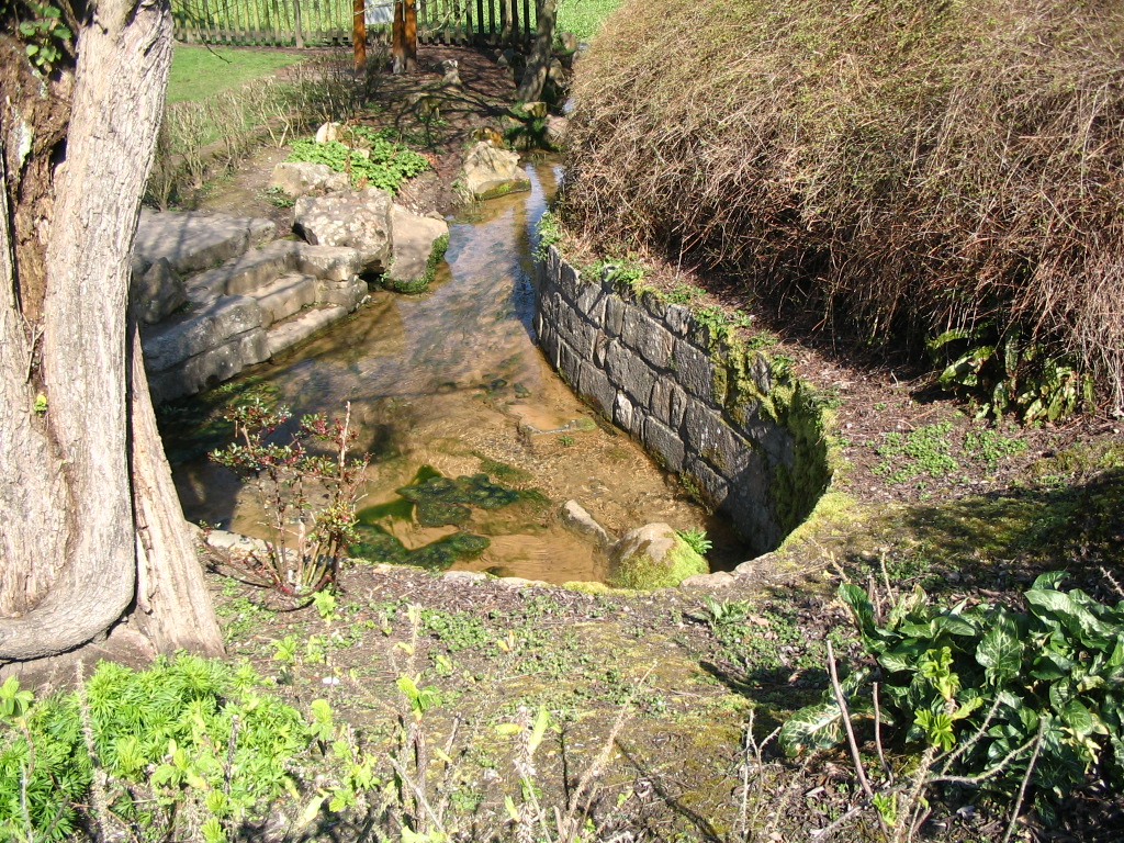 Les sources de la Veules, à Veules-les-Roses, en France.